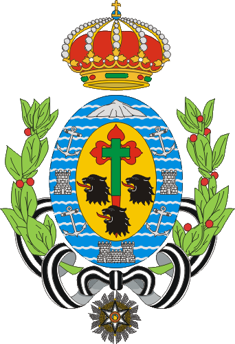 Escudo de Santa Cruz de Tenerife (provincia de Santa Cruz de Tenerife, España)